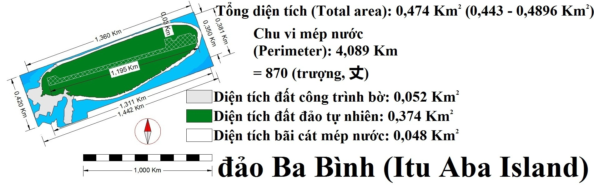 Bản đồ đảo Ba Bình (Itu Aba Island, 太平島) thuộc quần đảo Trường Sa (Spratly Islands).